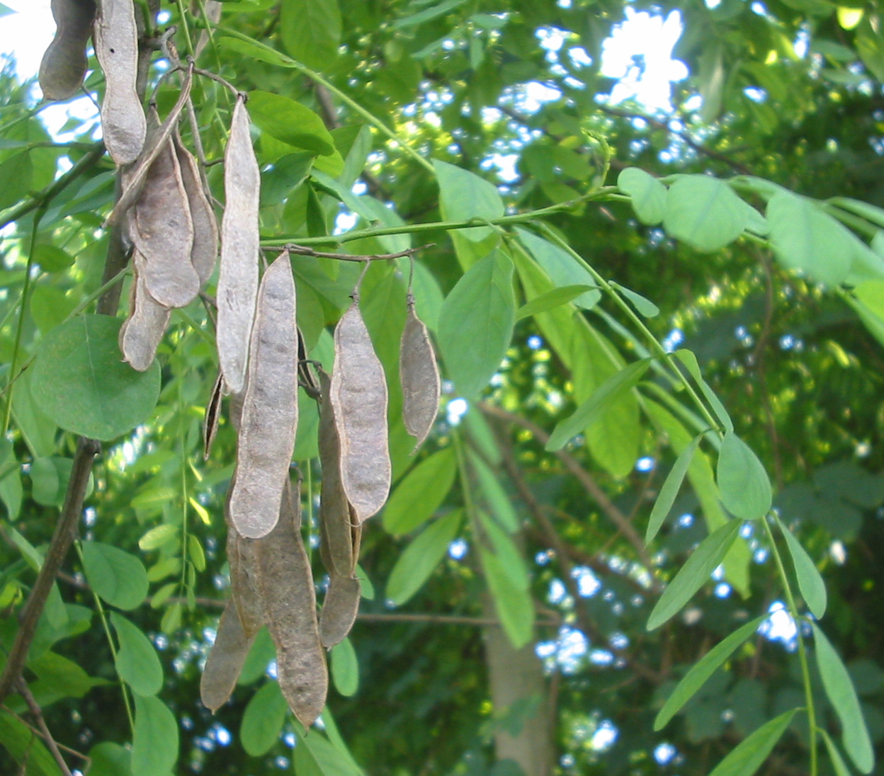 Robinia pseudacacia